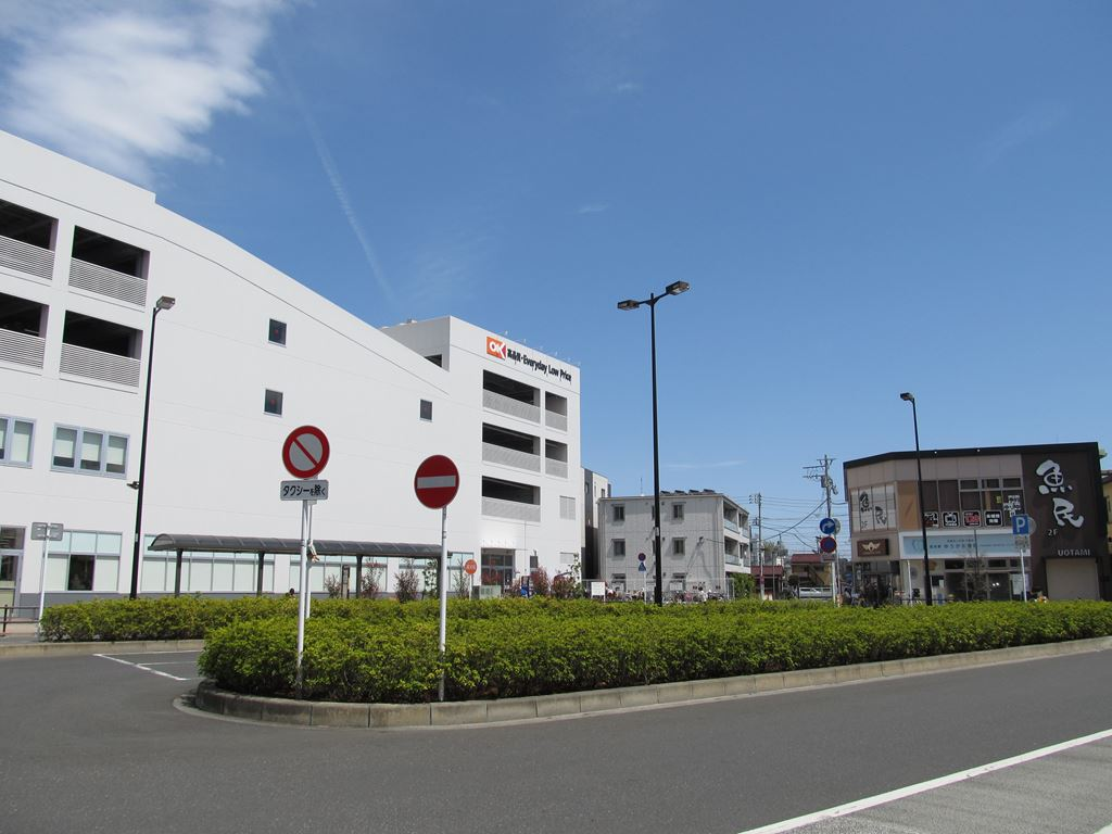 西府駅北ロータリー